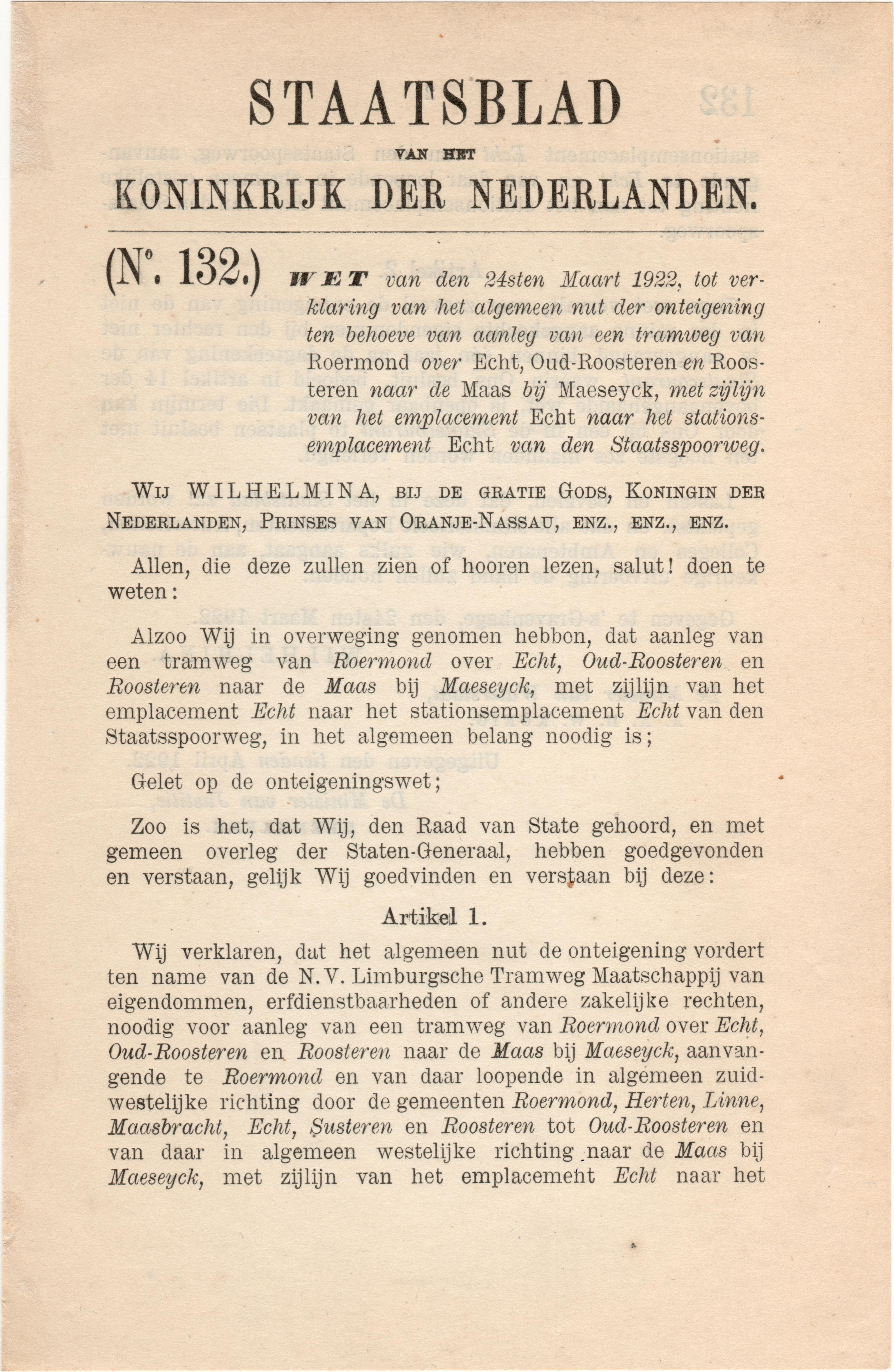 A.A.H.W. König (10 April 1922) Staatsblad van het Koninkrijk der Nederlanden. (No. 132.) WET van den 24sten Maart 1922, tot verklaring van het algemeen nut der onteigening ten behoeve van aanleg van een tramweg van Roermond over Echt, Oud-Roosteren en Roosteren naar de Maas bij Maeseyck, met zijlijn van het emplacement Echt naar het stationsemplacement Echt van den Staatsspoorweg. ['s-Gravenhage]: De Minister van Justitie, HEEMSKERK, p. 1.